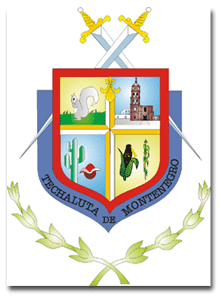 Escudo de armas de Techaluta de Montenegro.